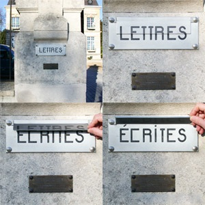 Boîte aux lettres de la Mairie de Fère-en-Tardenois, offerte par ALIS et consacrant la ville capitale mondiale de la Poésie à 2 mi-mots.